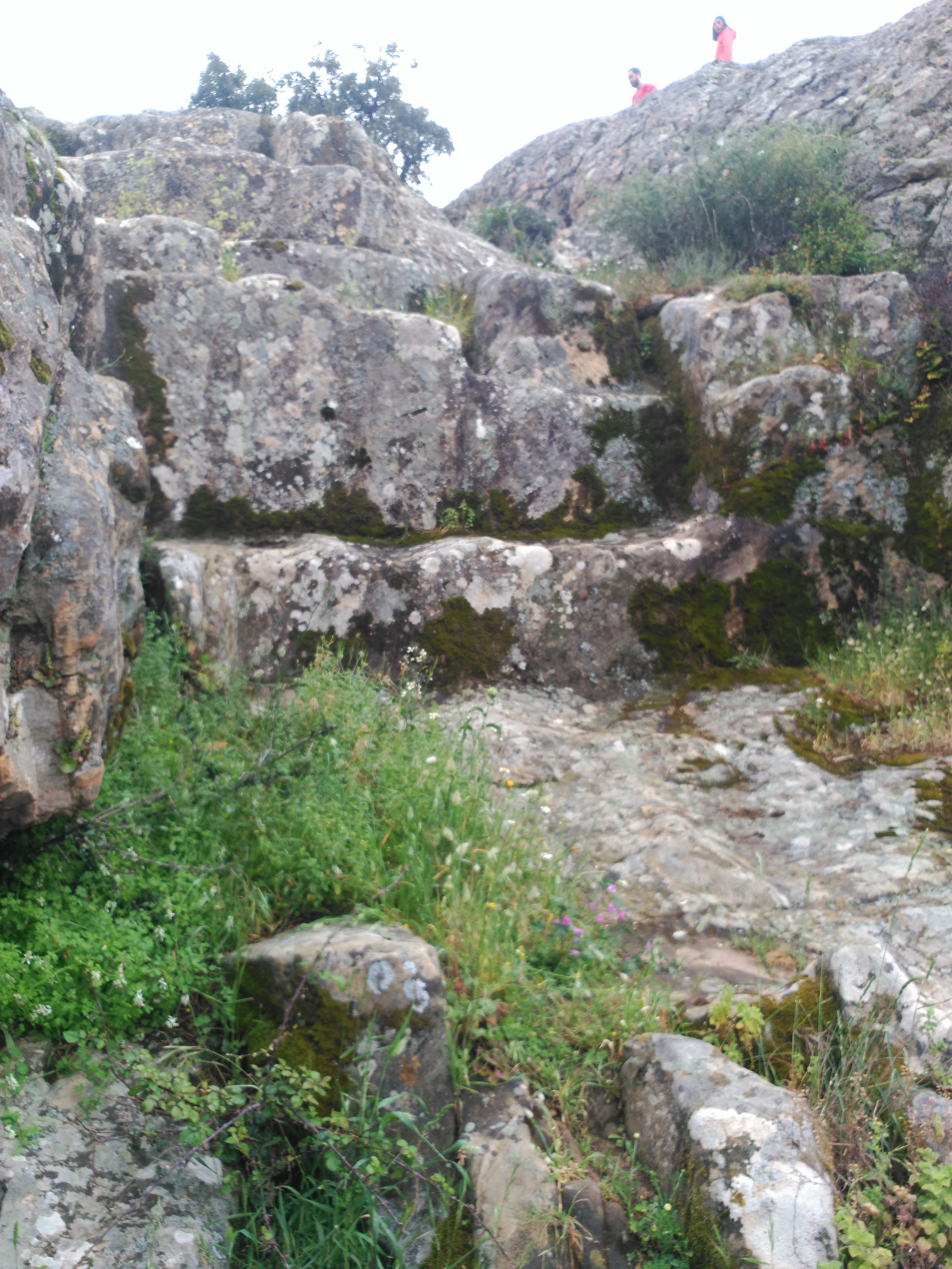 Cantera